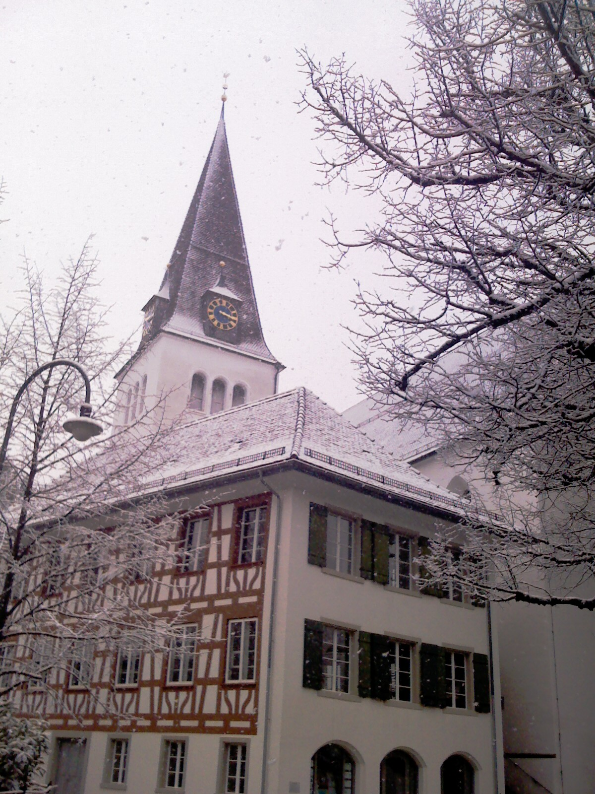 Elgg Protestant Church, Canton Zurich, Switzerland - Elgg Protestanta preĝejo, Kantono Zuriko, Svislando